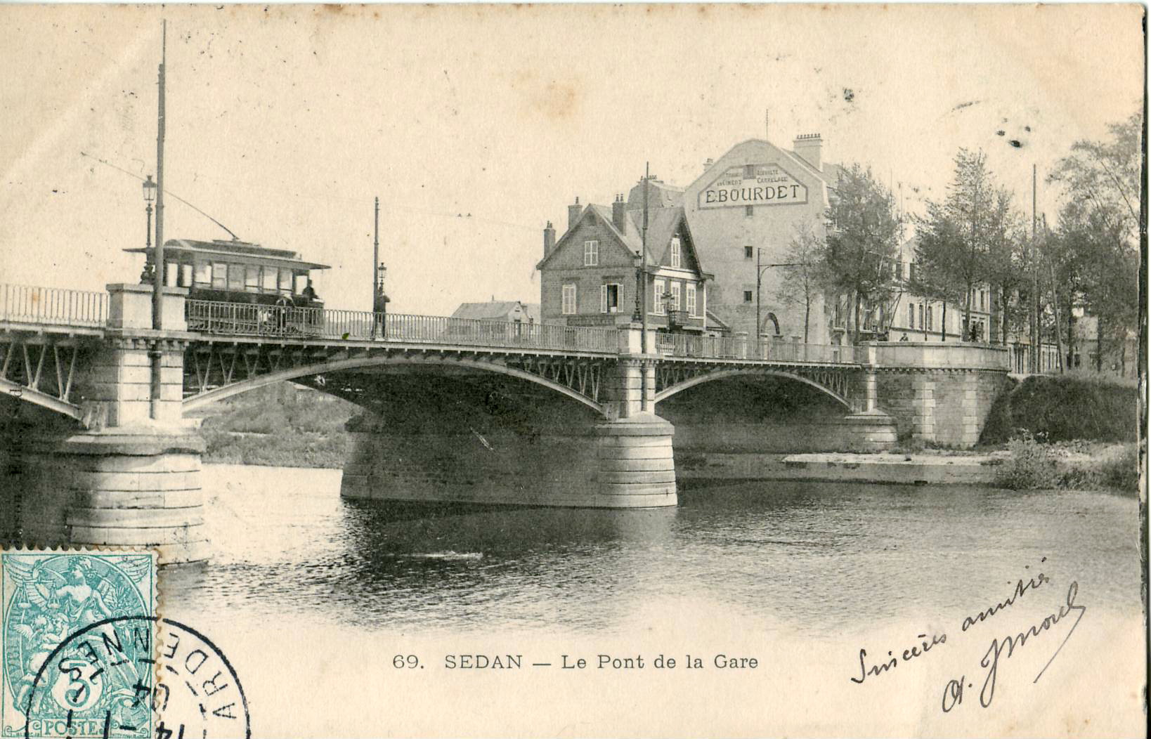 Carte postale ancienne sans mention d'éditeur, n°69 : SEDAN - Le Pont de la Gare